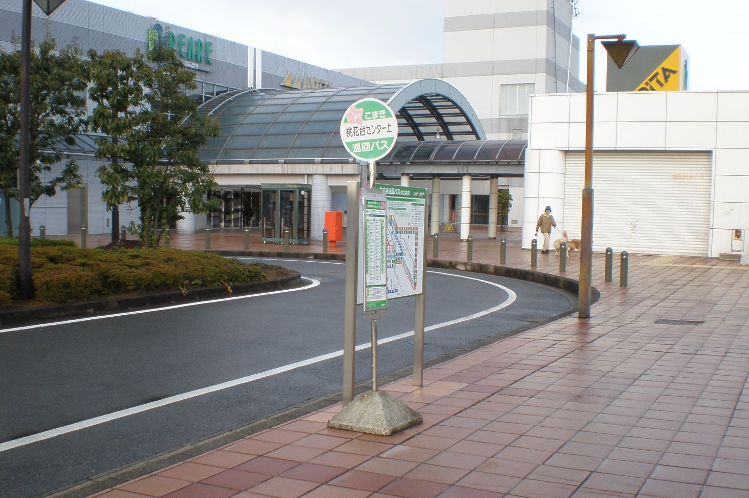 愛知県小牧市にあるこまき巡回バス桃花台センター上停留所